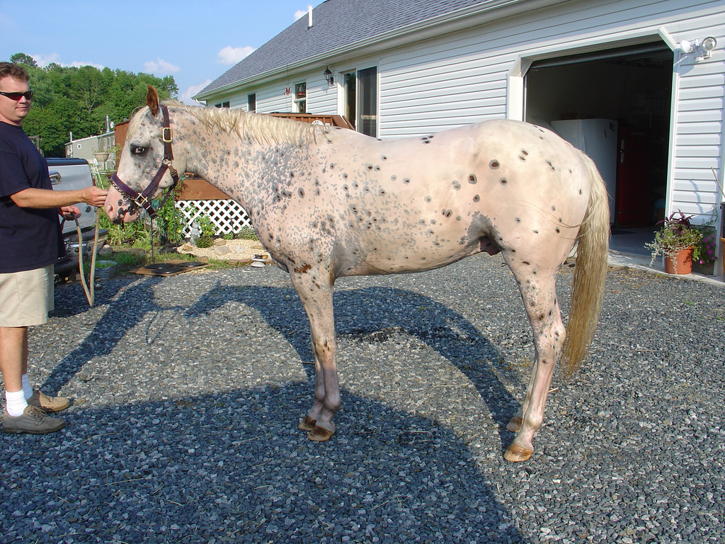 Appaloosa gelding